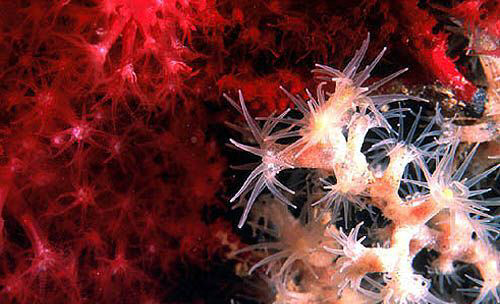 Gerardia savaglia Syn. Savalia savaglia, particular